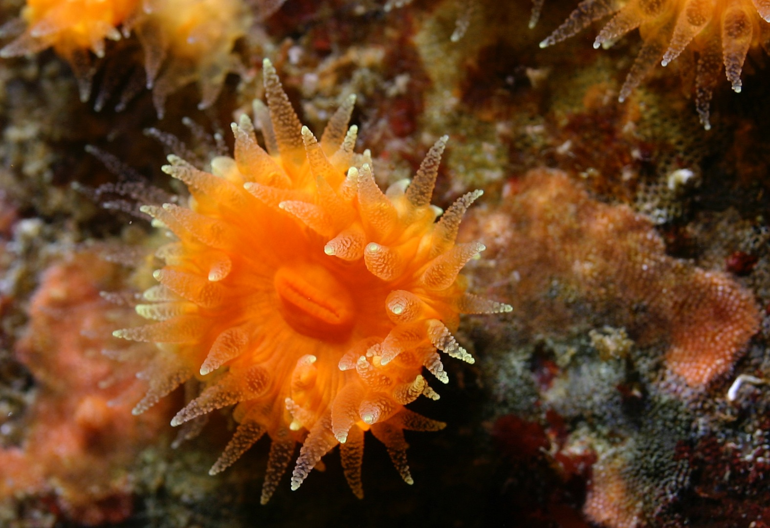 Coral copa Balanophyllia elegans en la bahía de Carmel, EE.UU.